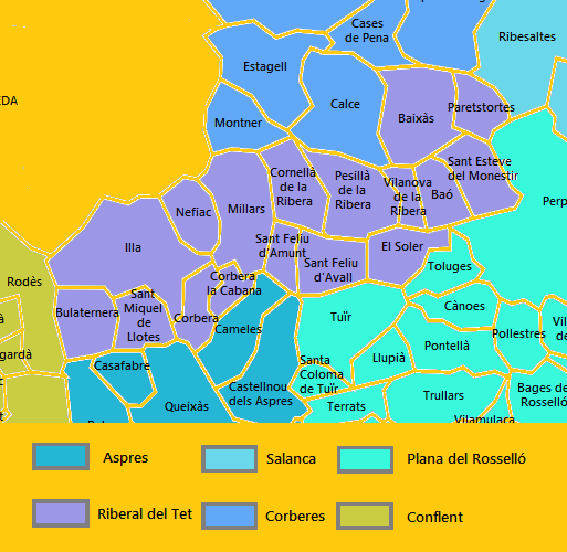 Mapa del Riberal del Tet elaborat a partir d'un mapa de lliure distribució